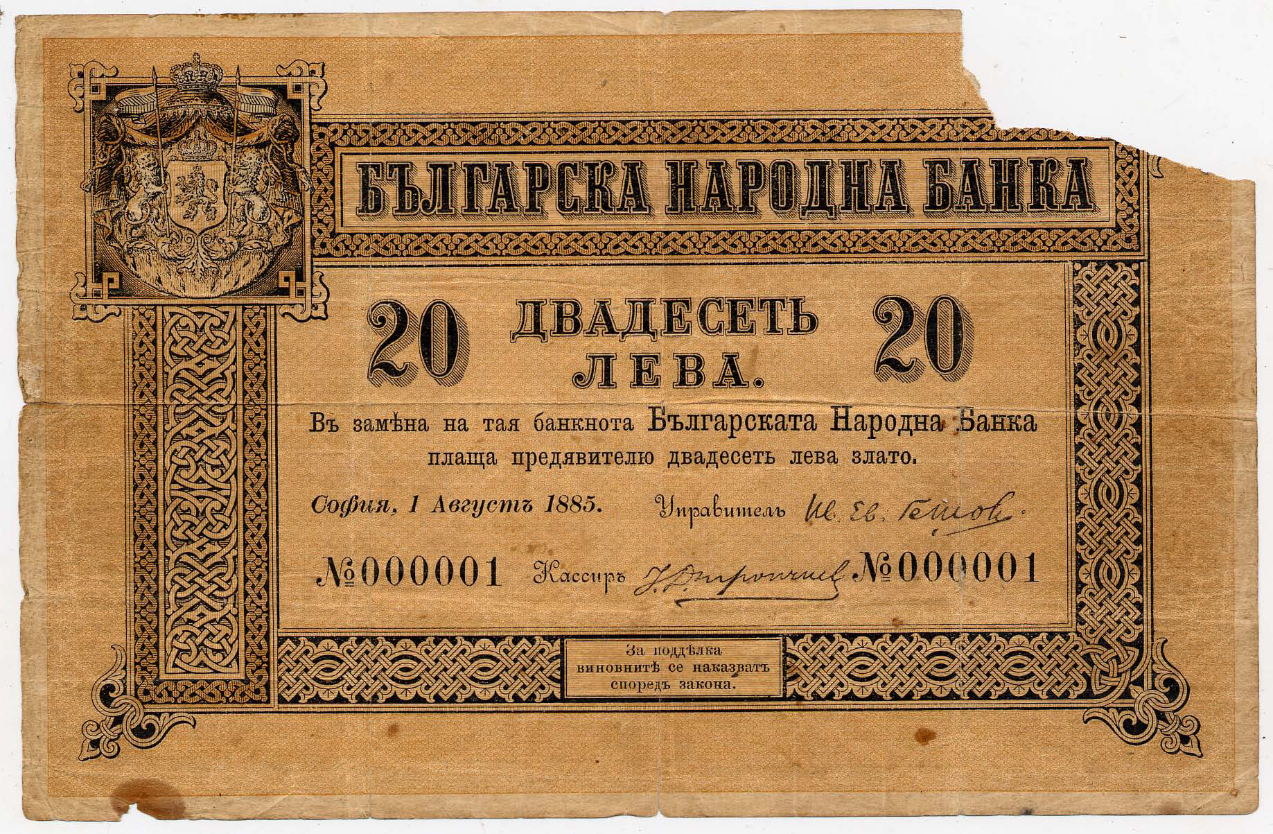 Първата българска банкнота - лице. Оригиналът се съхранява в Историческия музей на гр. Габрово.